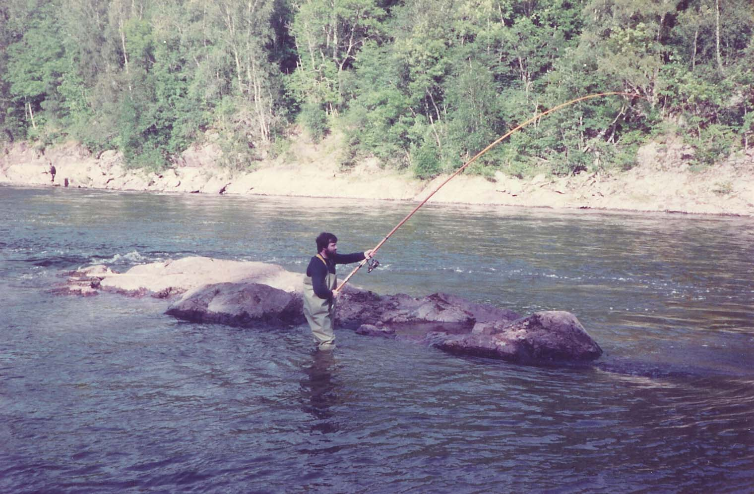 Laksefiske i NumedalslÃ¥get 1985.